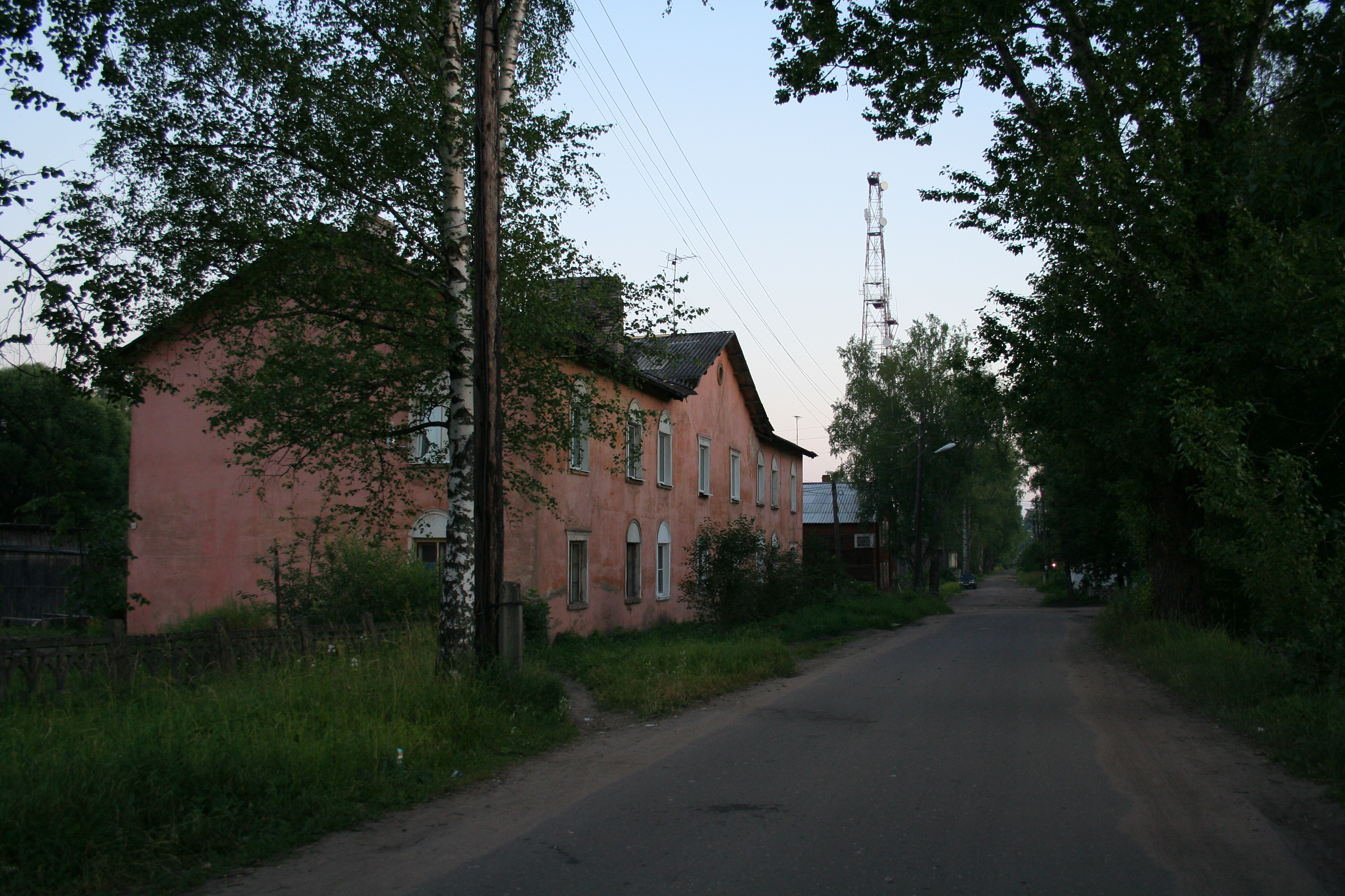 Stadt Okulowka (Oblast Nowgorod, Russland). Diverse Wohnhäuser.